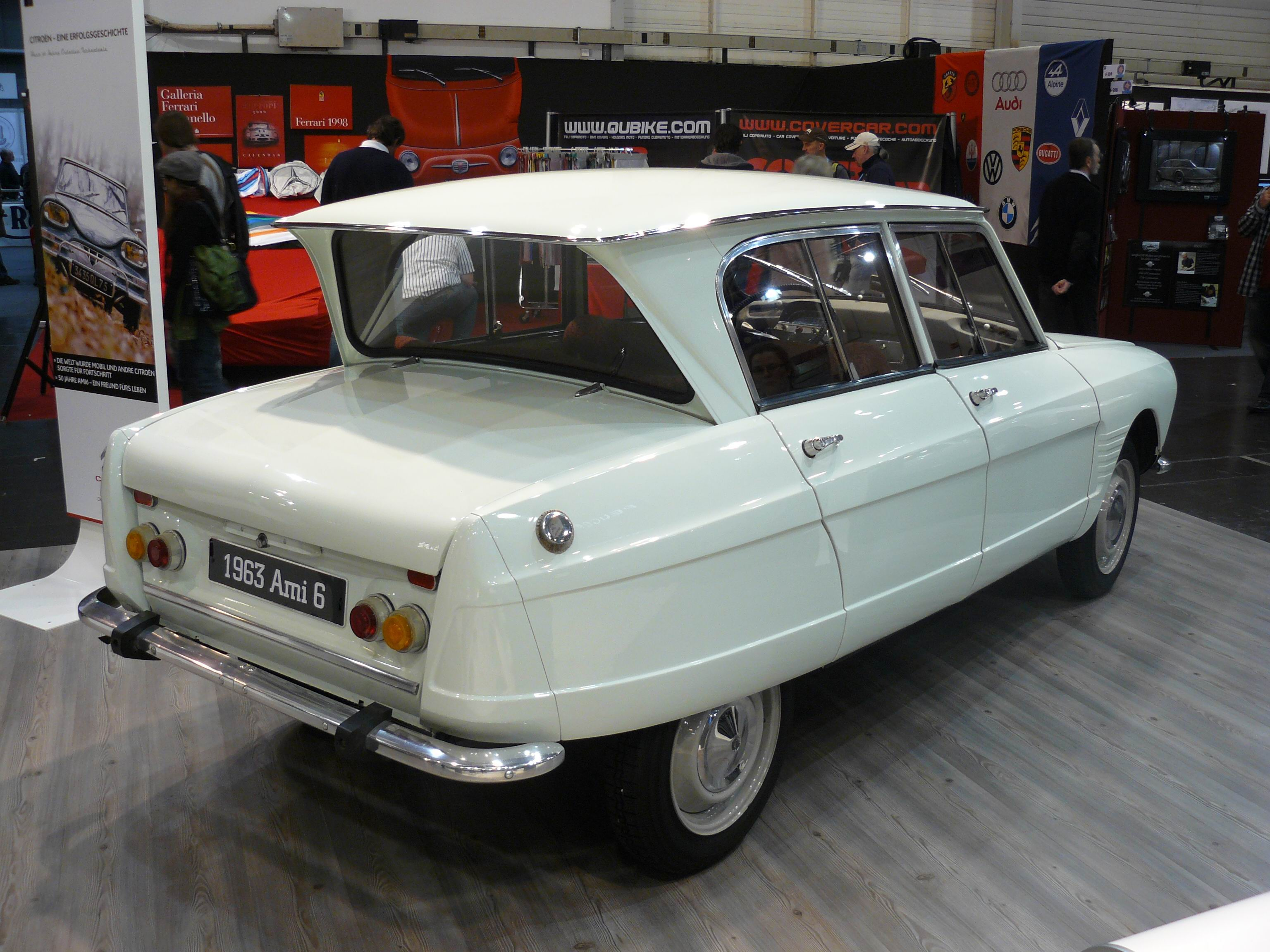 Essen 2011